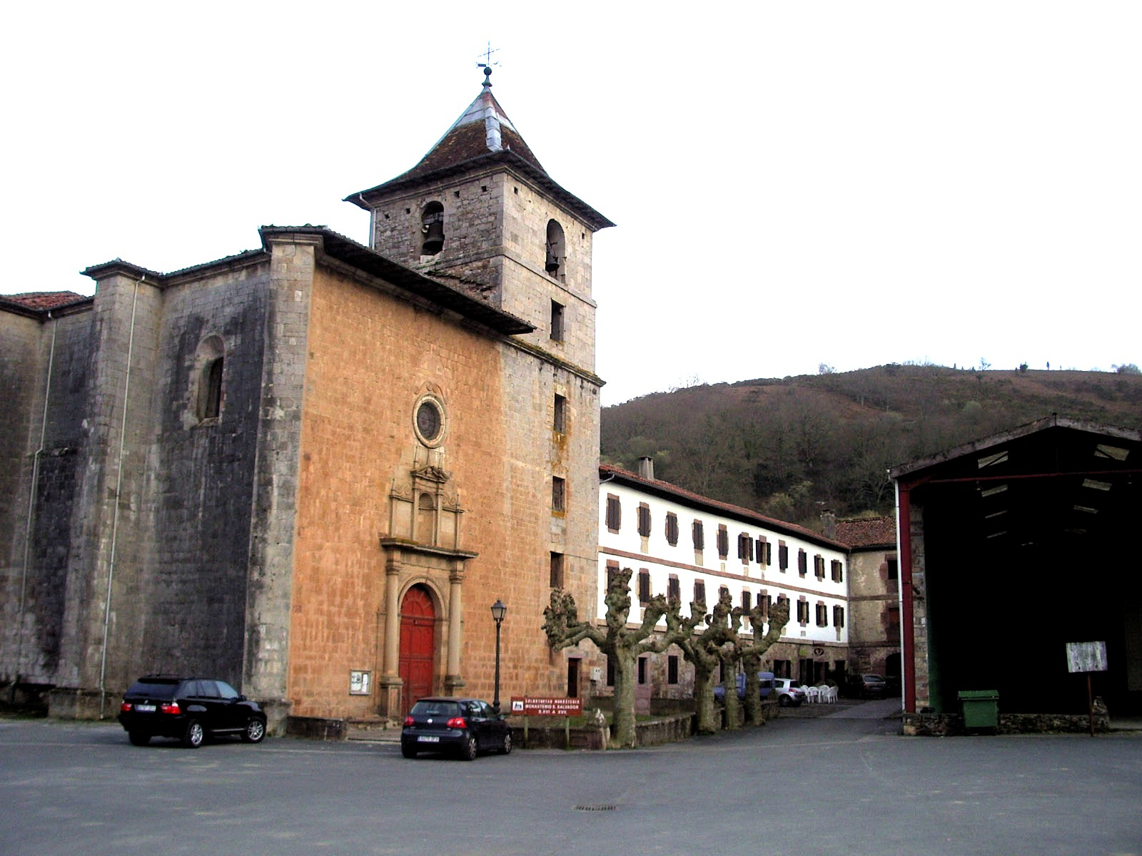 Urdazubiko monasterioa